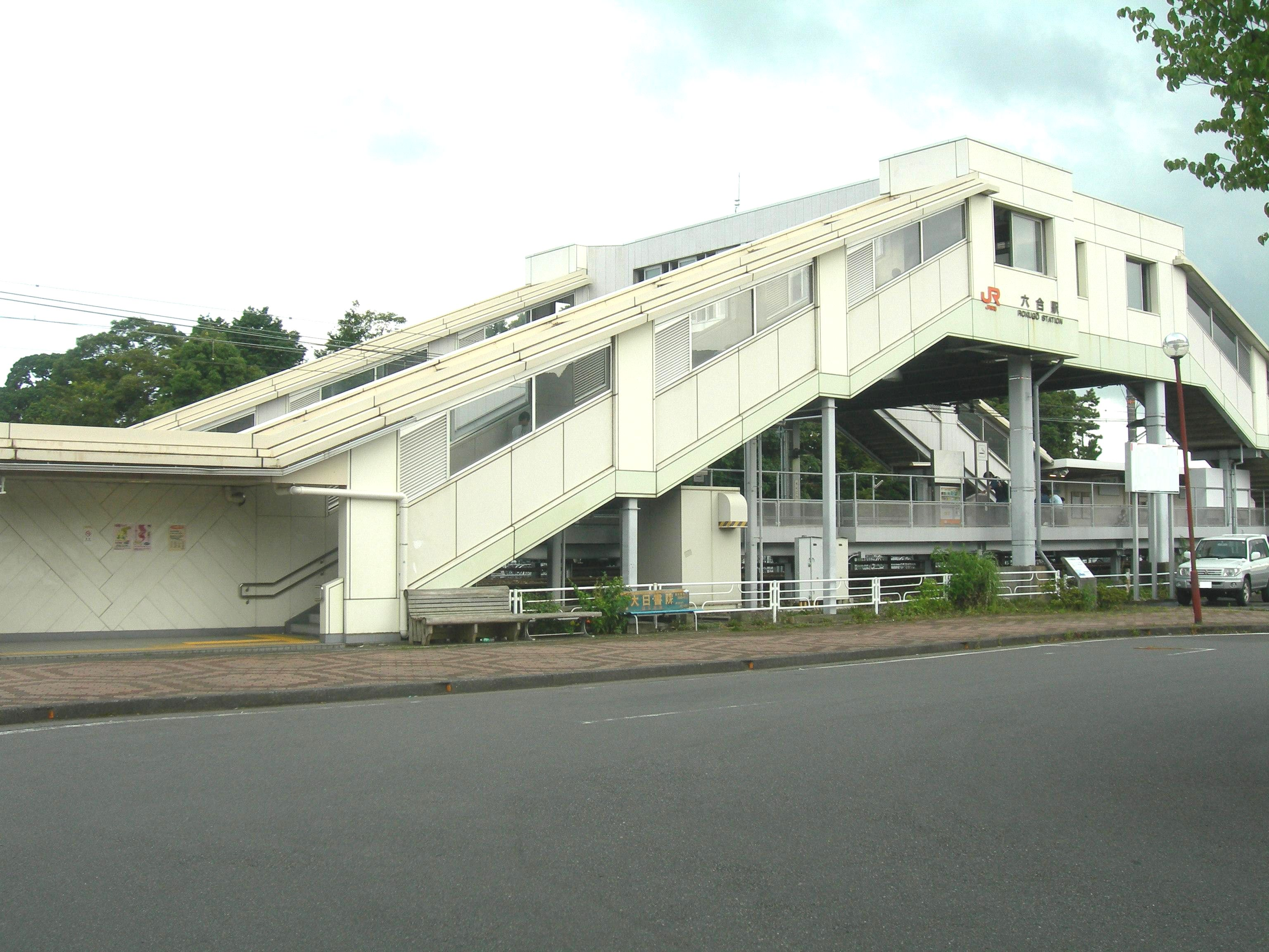 六合駅